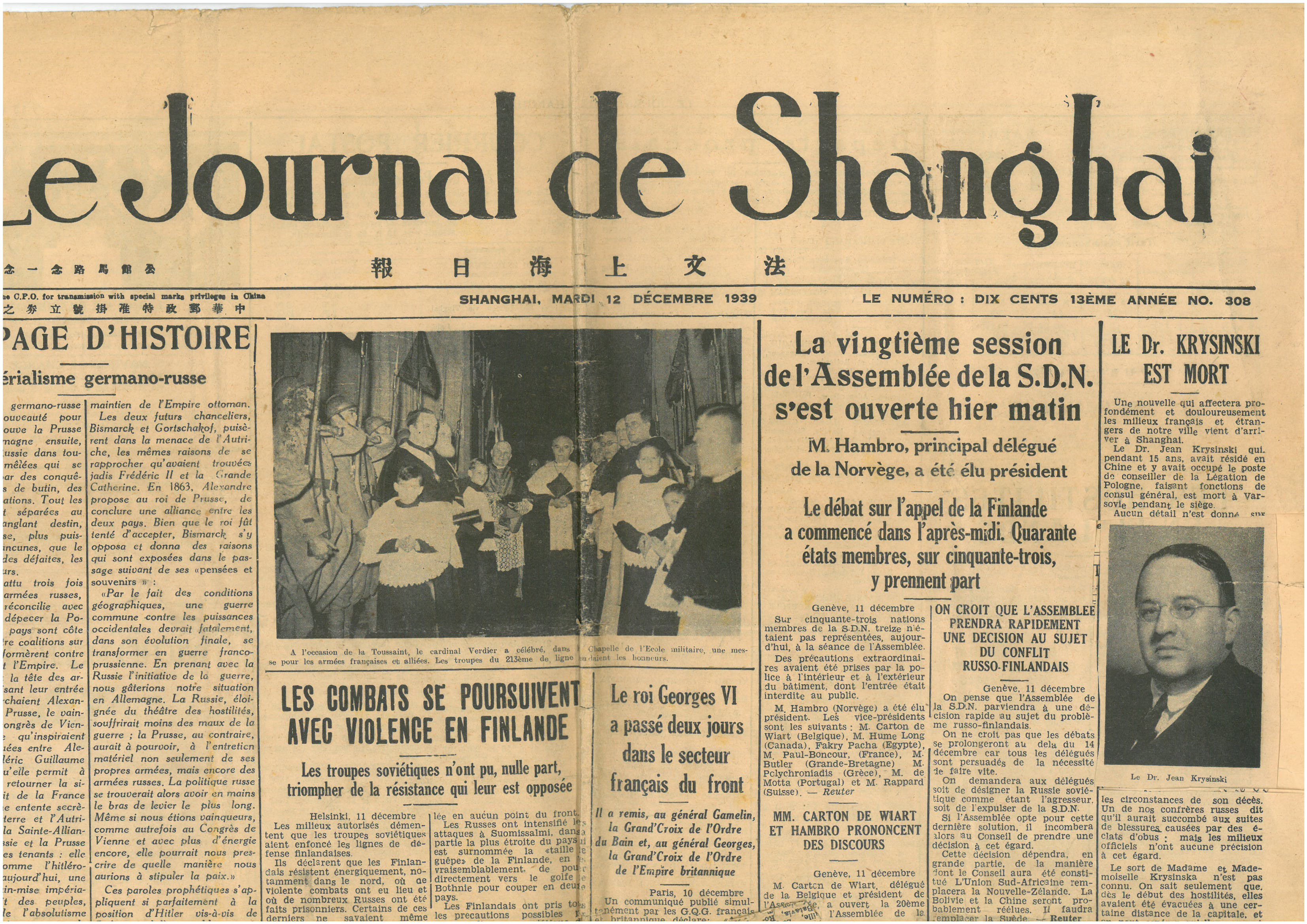 Informacja o śmierci i wspomnienie osoby dr Jana Krysińskiego w Le Journal de Shanghai, "Le Dr Krysiński est mort"